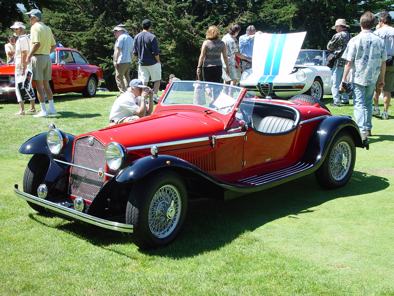 DSC09546 Alfa Romeo Gran Sport Quattroruote at 2003 Concorso Italiano, Seaside, CA.